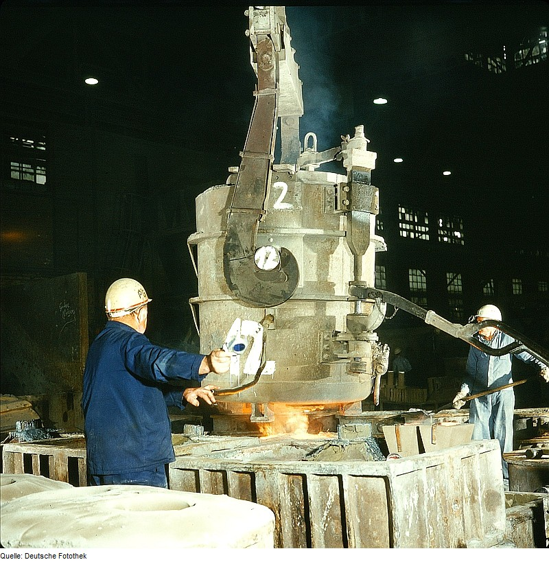 Original image description from the Deutsche Fotothek Facharbeiter für Gießereitechnik